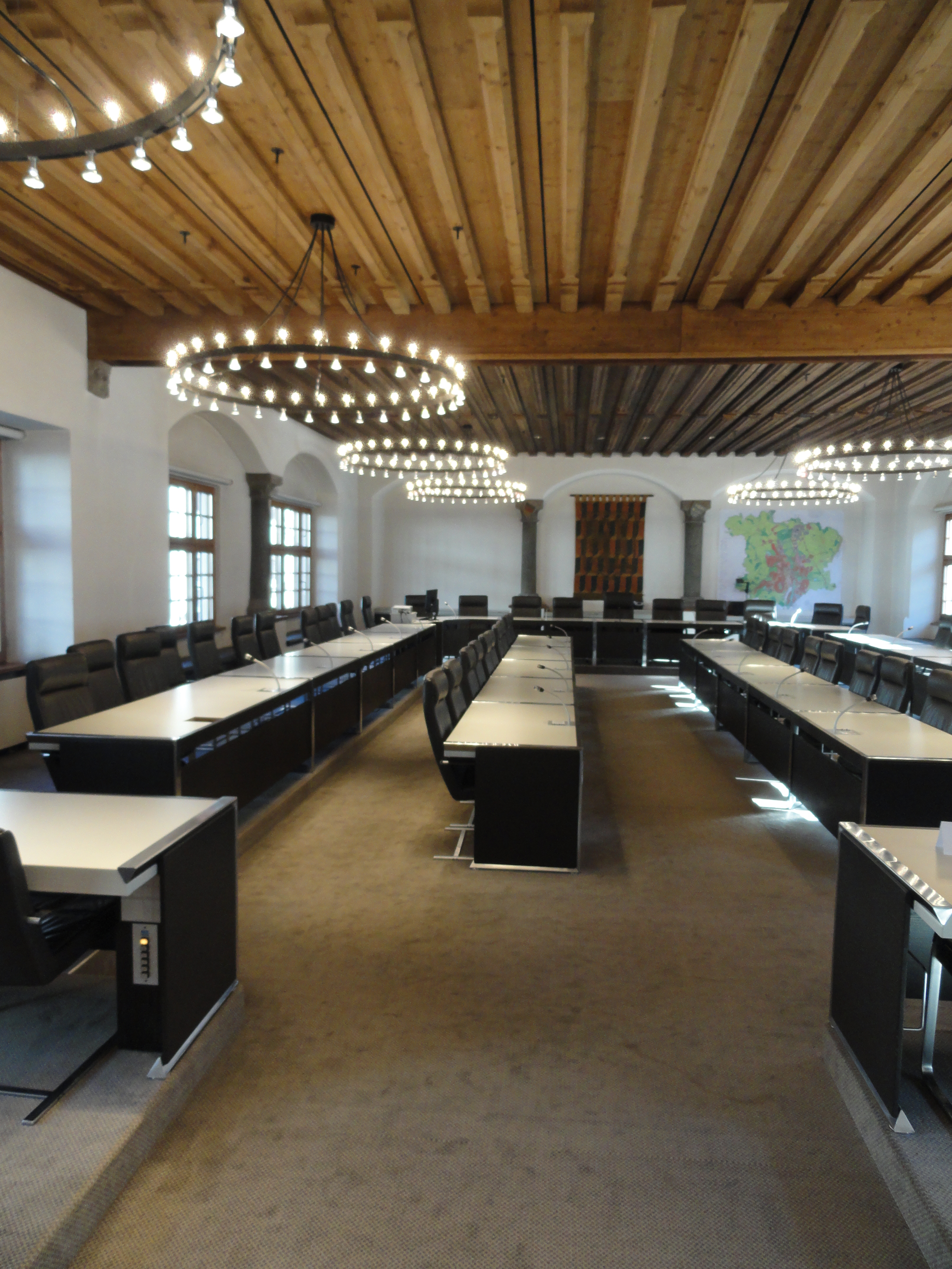 Großer Saal im Rathaus Kempten